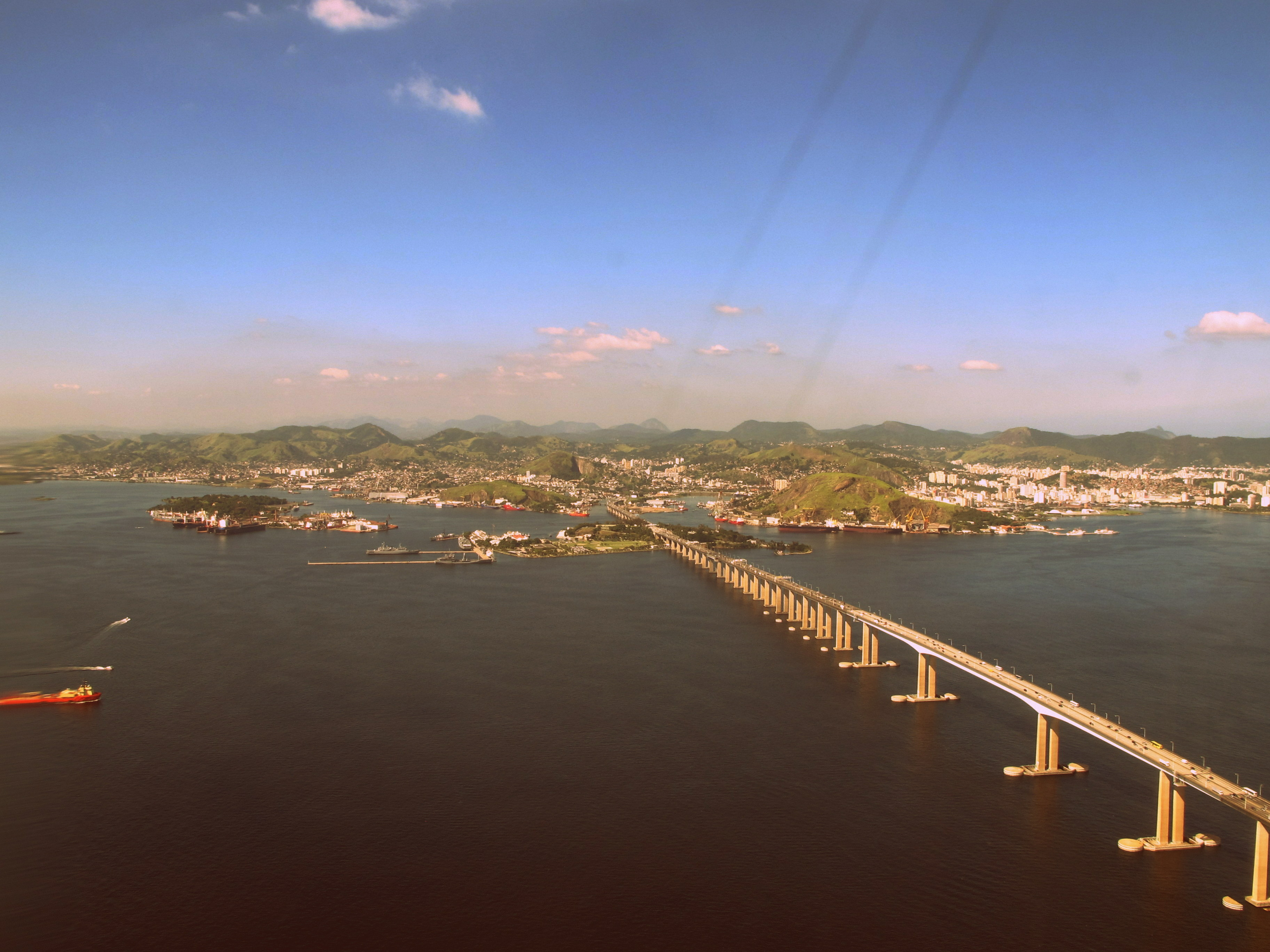 Vista aérea da Baia de Guanabara